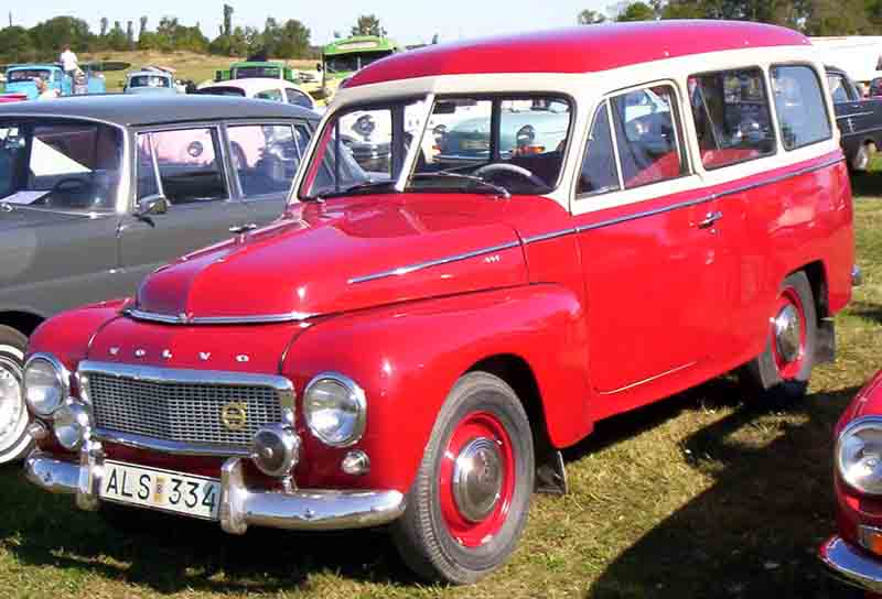 Volvo P445 1960